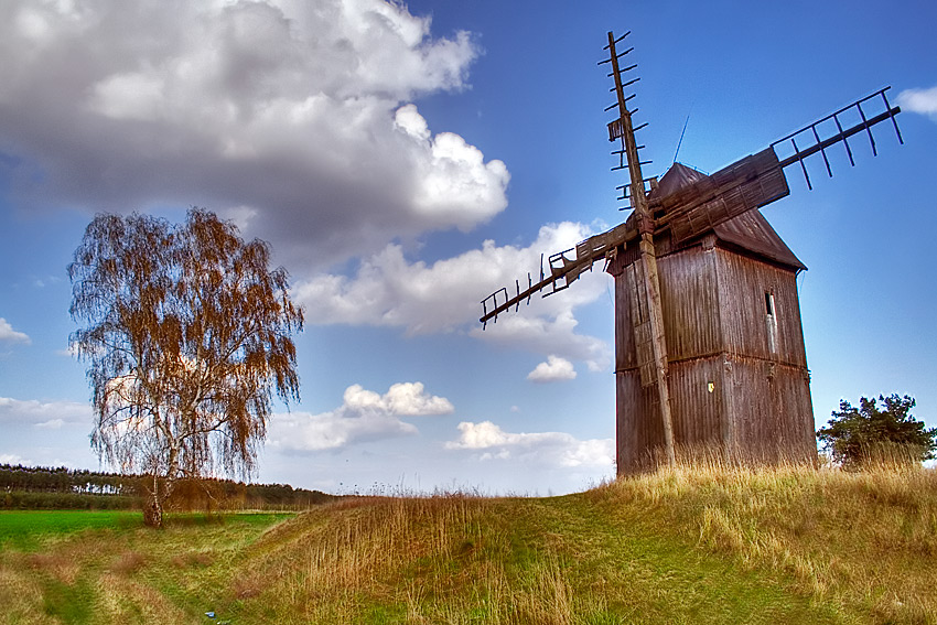 Wiatrak w Lubięcinie